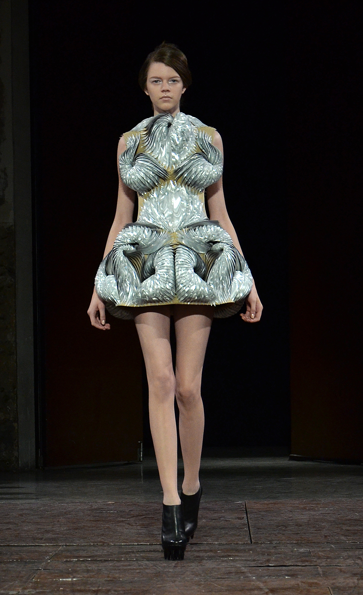 Iris Van Herpen model: Antonia Wesseloh Iris van Herpen - Haute Couture Spring/Summer 2012.